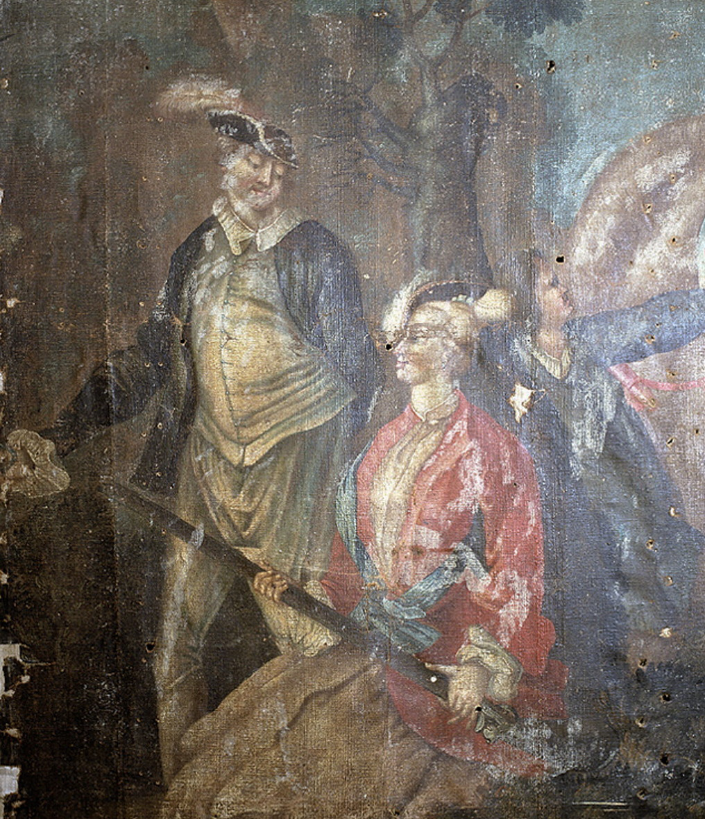 Detalj av väggmålning Tjärhovsgatan 7, upphov Anders Balck